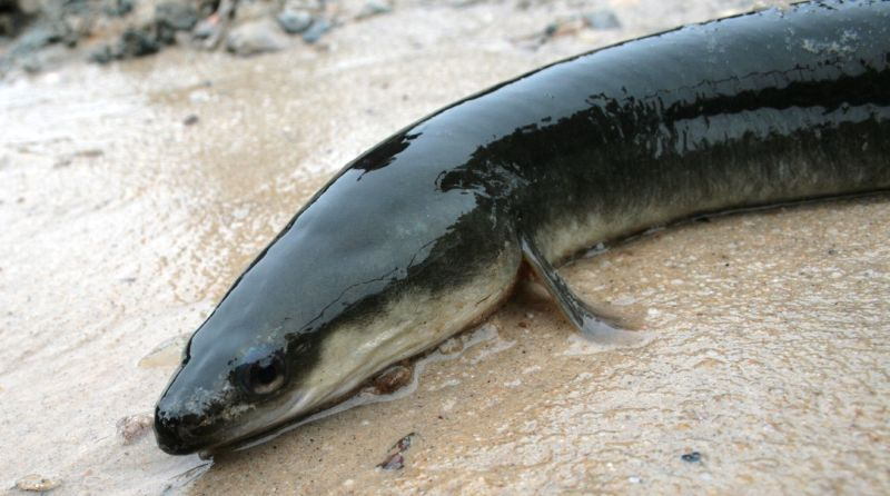 American eel (Anguilla rostrata)